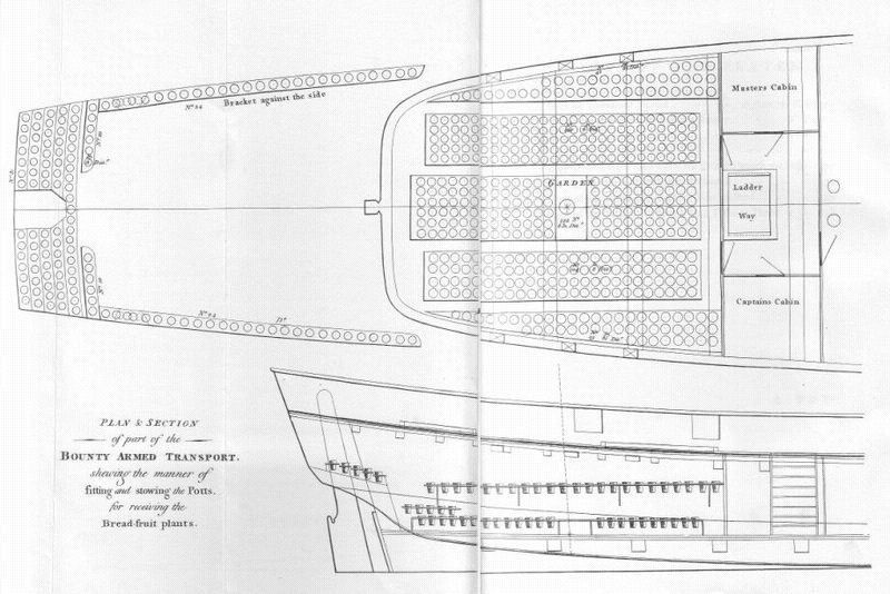 Coupe de l'arrière de la Bounty de